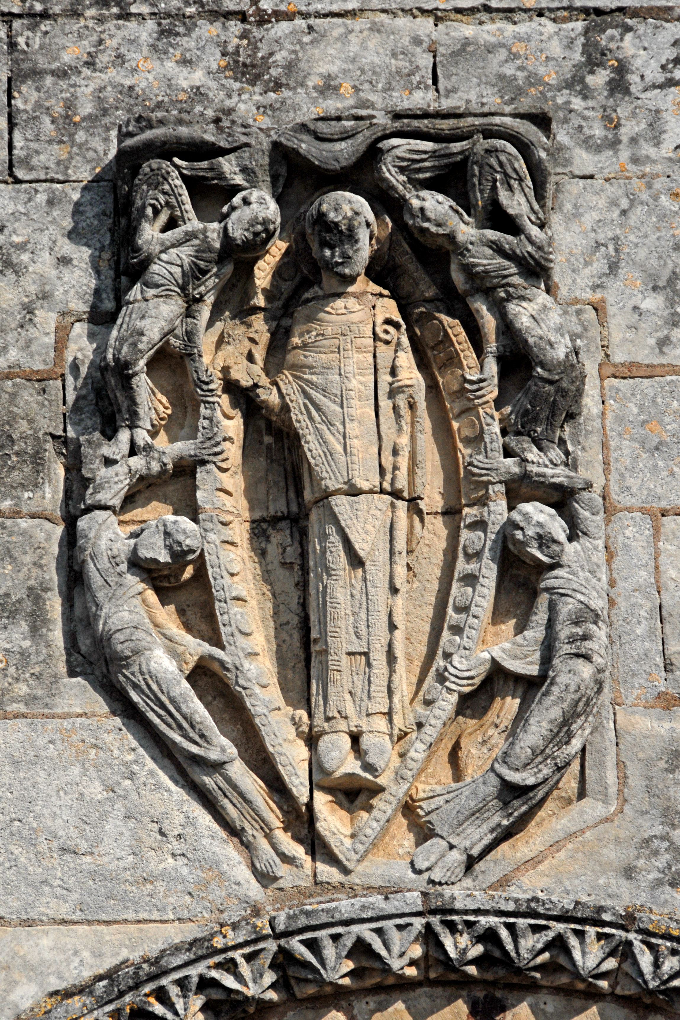 Genzac-la-Pallue, Hochrelief, St.-Martin in der Mandorla